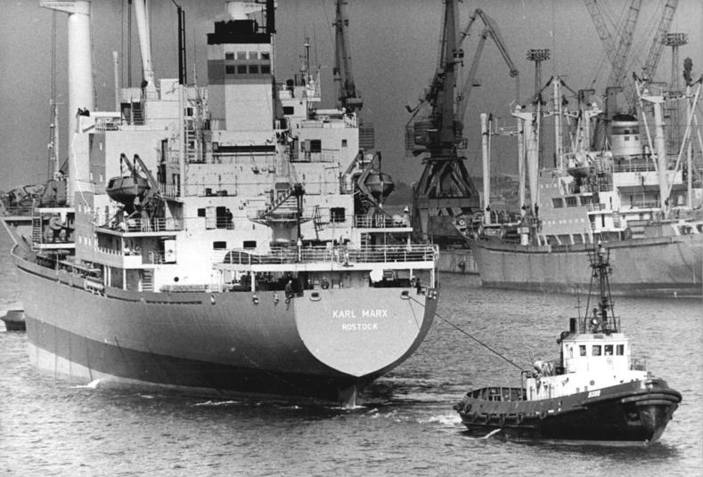 Rostock, Überseehafen, Frachter, Schlepper ADN-ZB Sindermann 30.3.83 Rostock: Der DDR-Schnellfrachter "Karl Marx" lief kürzlich nach fünfmonatiger Fahrt zum persischen Golf und nach Jugoslawien wieder im Heimathafen Rostock ein. Fast 130.000 Mark Eigenleistungen in Form von Reparatur-Instandsetzungs- und Wartungsarbeiten will das Besatzungskollektiv im Karl-Marx-Jahr erbringen. Da 166 Meter lange Schiff hat eine Tragfähigkeit von 10322 Tonnen - siehe auch 1983-0330-3, 4N